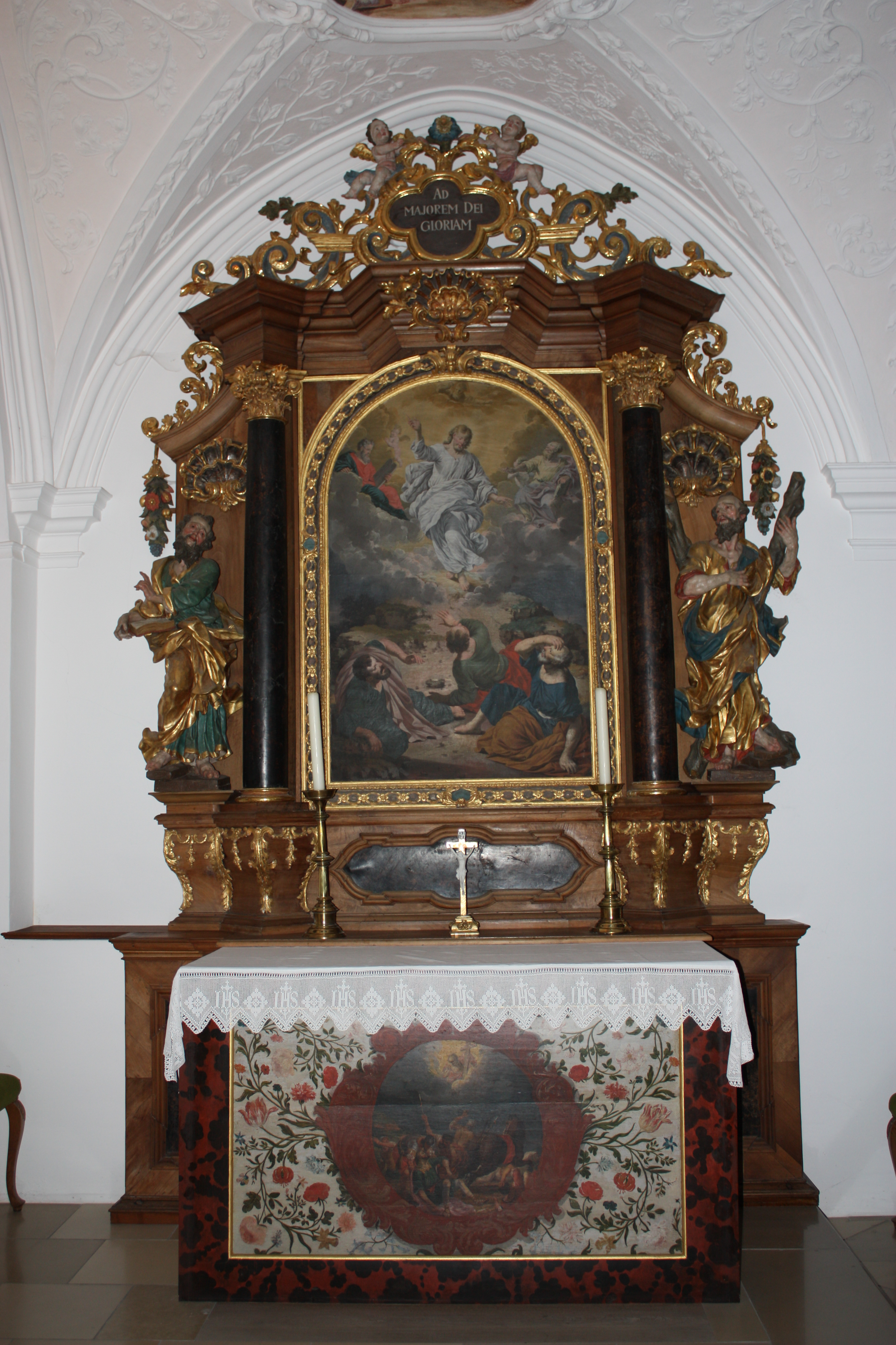 Nördlicher Brüderchoraltar in der ehemaligen Klosterkirche der Kartause in Buxheim bei Memmingen - OpenStreetMap(Info)